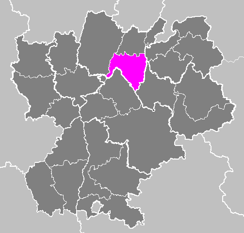 Maps of arrondissements and cantons of France: Arrondissement de Belley.PNG (Région Rhône-Alpes)